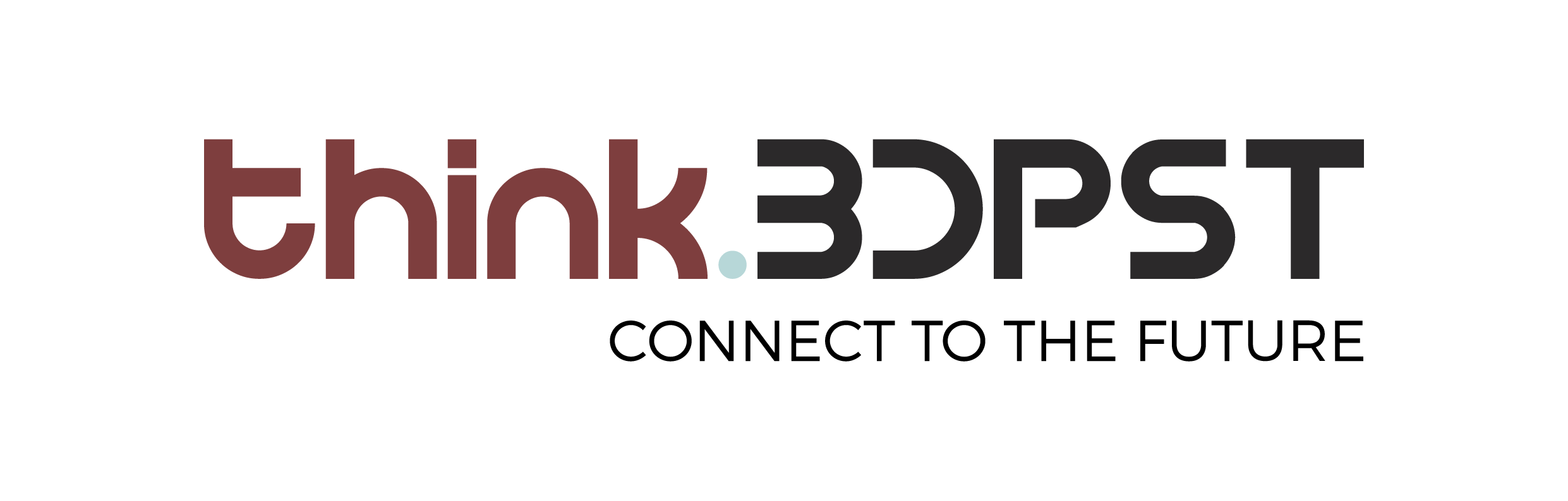 think.BDPST logója